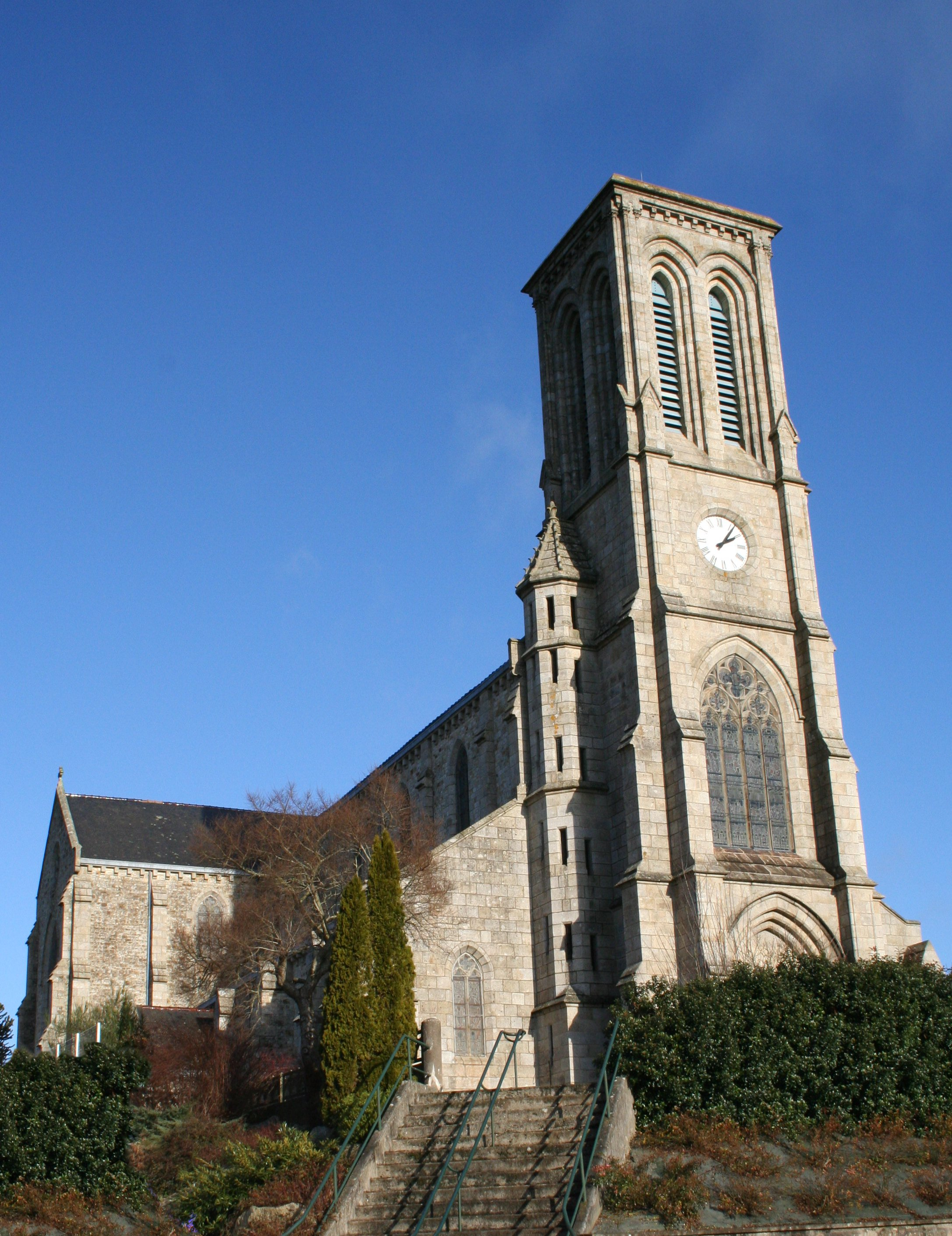 Eglise Saint-Laurent - Callac - Bretagne - France .